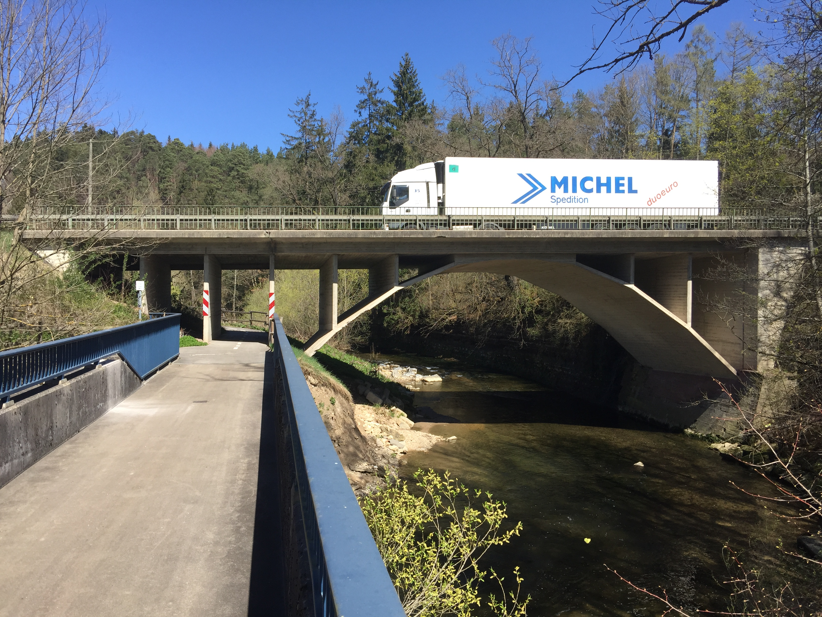 Die Eyachbrücke der Bundesstraße 463 beim Kühlen Grund (Balingen)